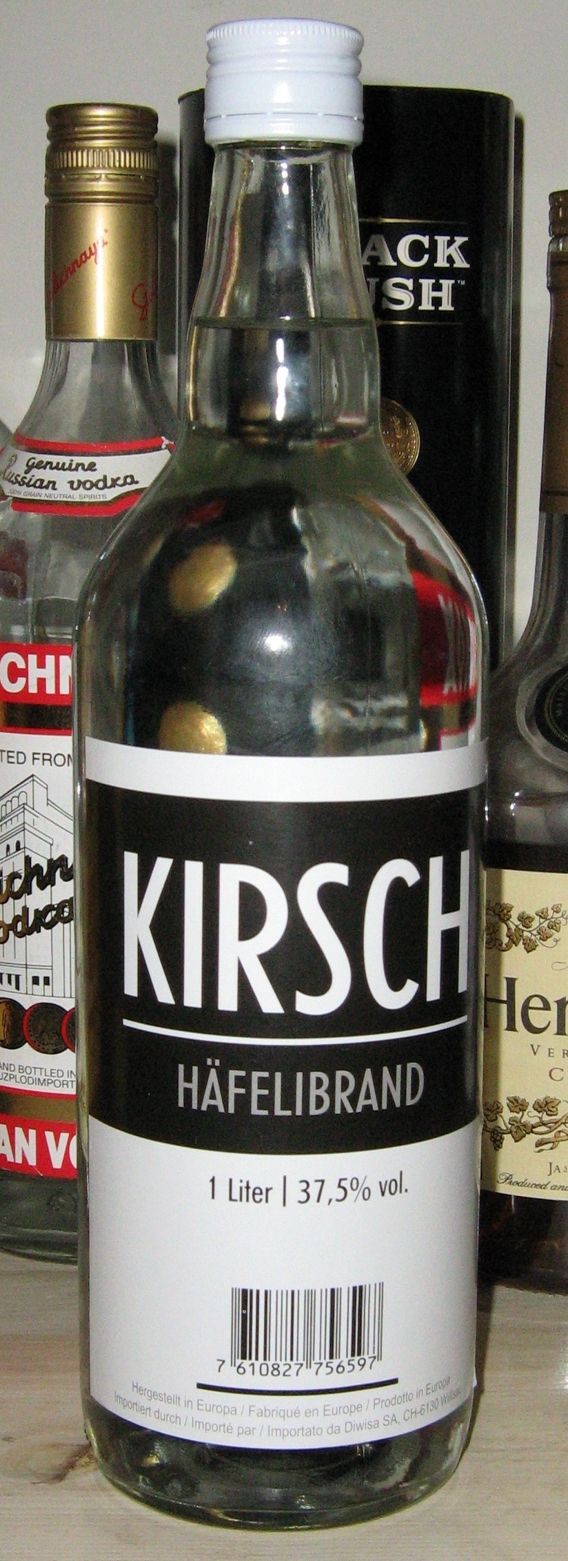 בקבוק קירש רישיון נוצר על ידי משתמש:גלנוס